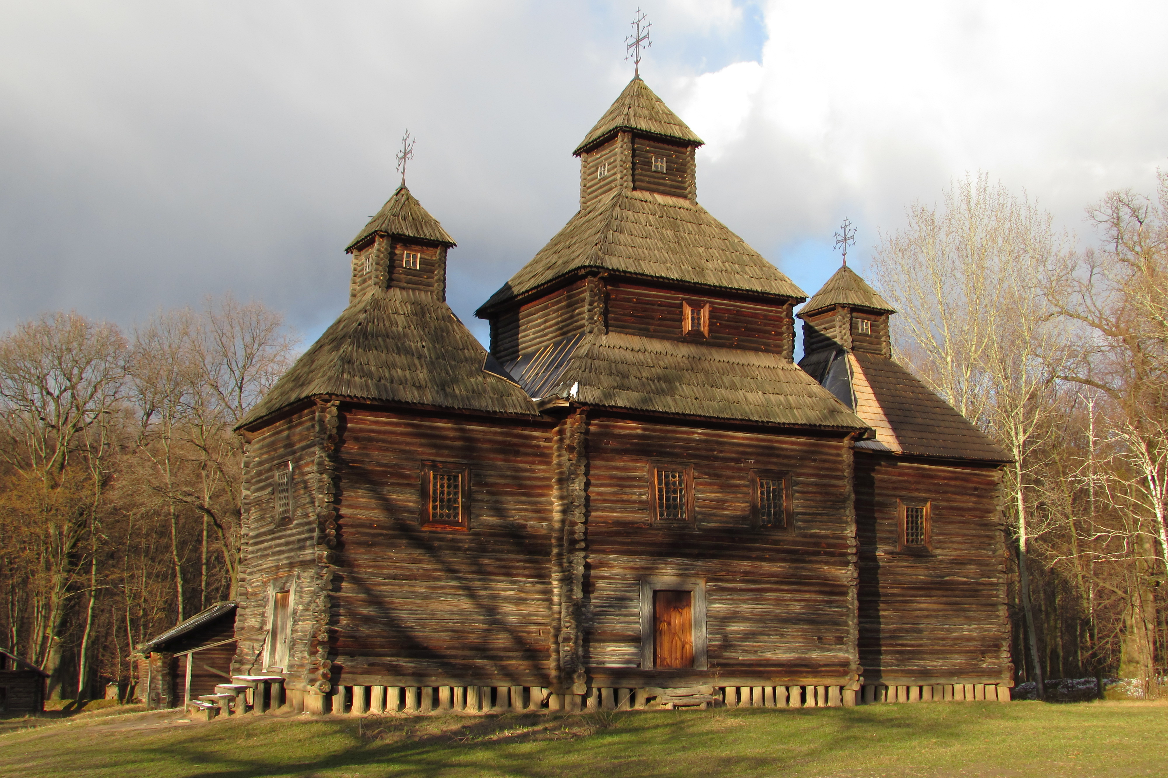 Церква з села Кисоричі Рокитнівського району Рівненської області, Київ, Пирогів